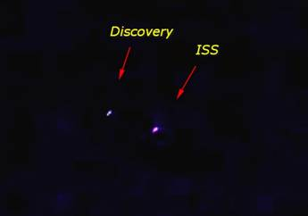 Acoplamiento Discovery a ISS